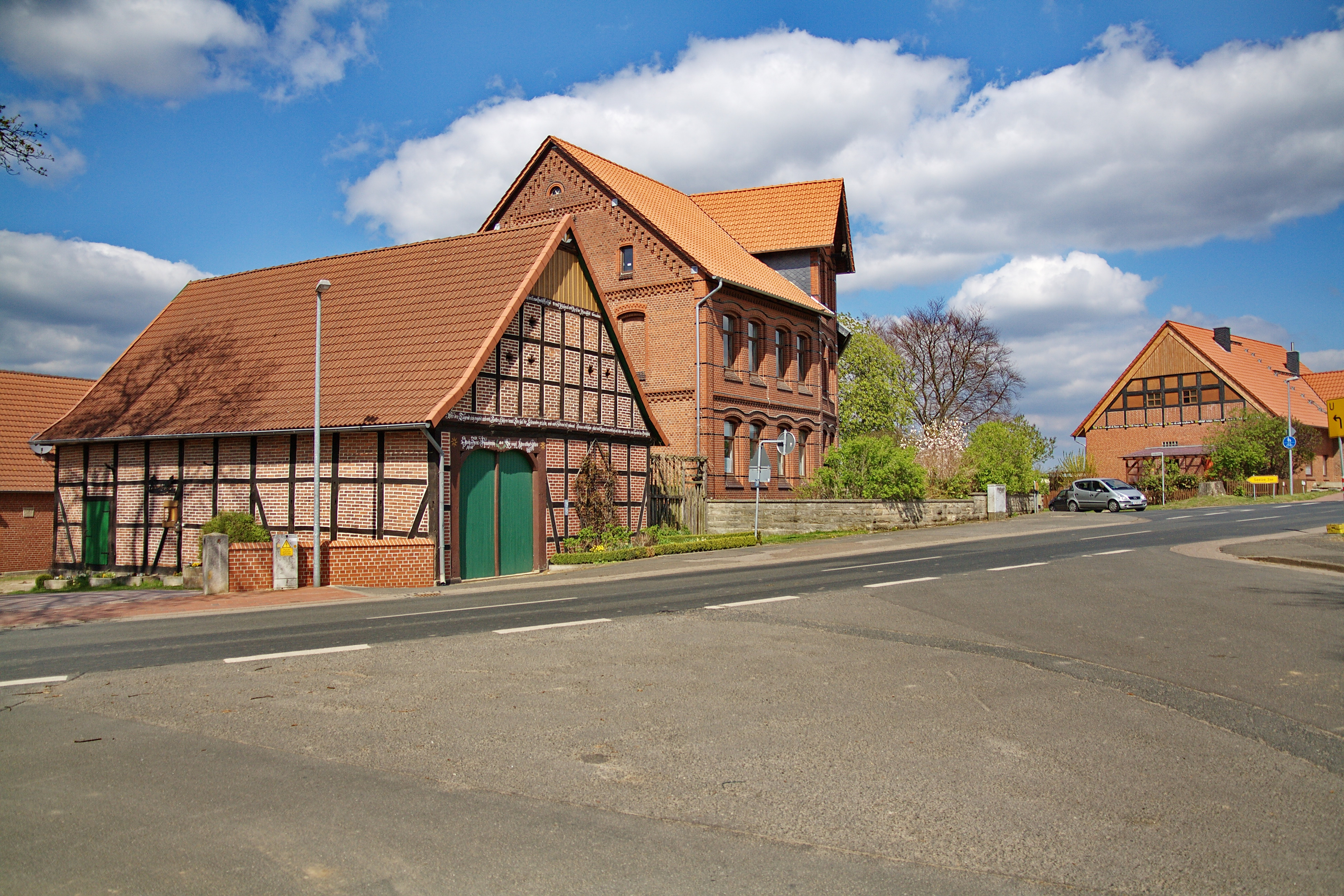 Ortsblick in Döteberg (Seelze), Niedersachsen, Deutschland